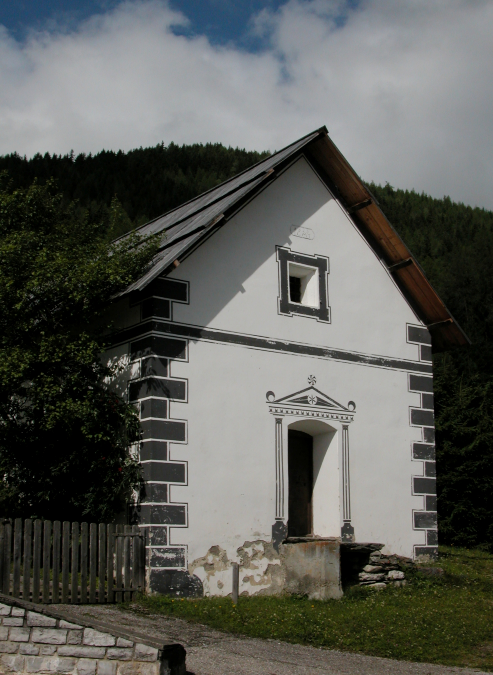 Getreidekasten (Troadkasten) in Weißpriach Lungau Land Salzburg Österreich. Schwarzenbichler Getreidekasten. [1]